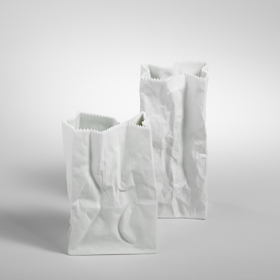 Porculanska vaza u obliku papirnatog škarnicla koju je Tapio Wirkkala dizajnirao za njemačku tvrtku Rosenthal, oko 1970.